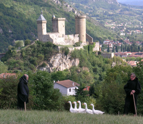 Chateau Foix